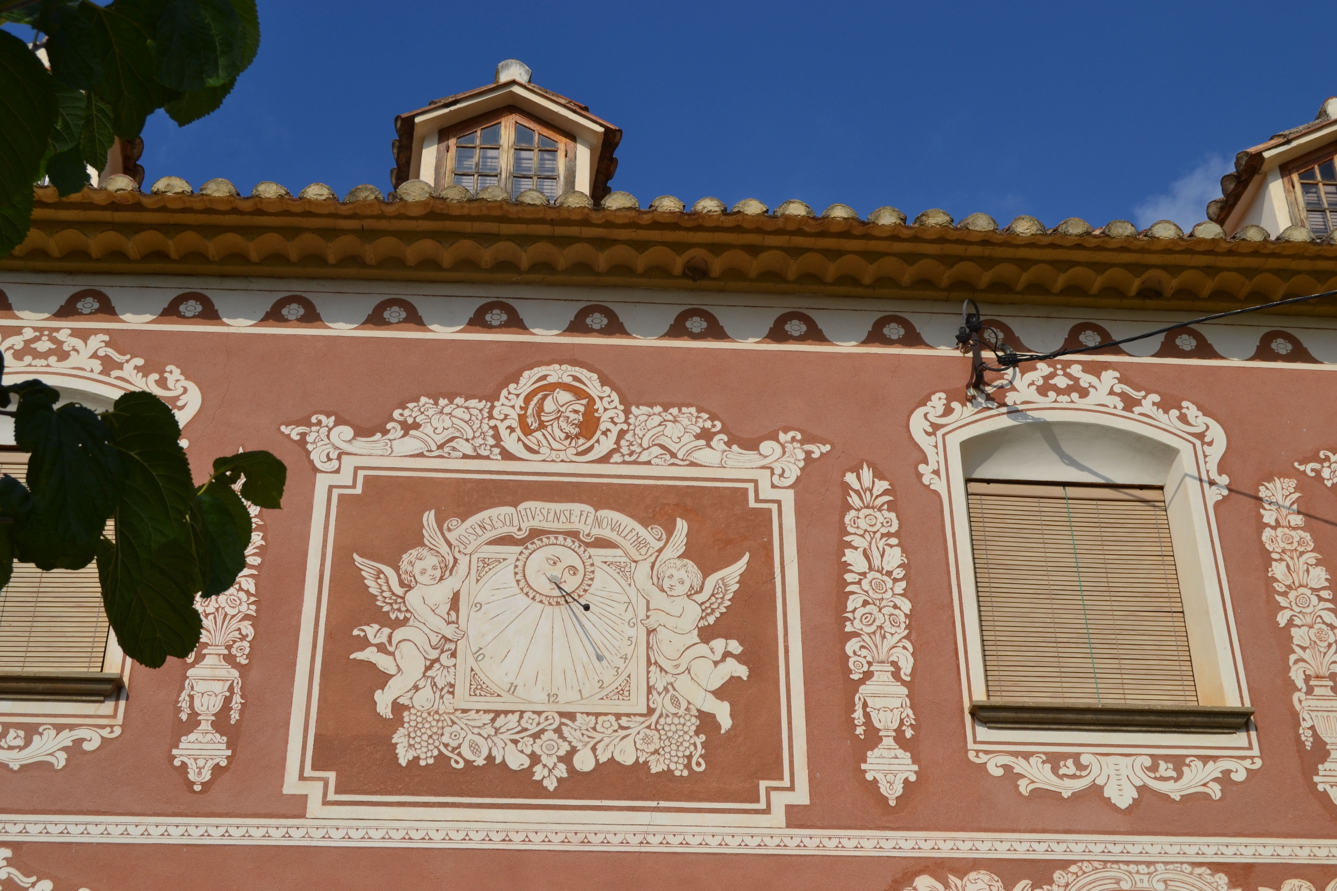 Adreça:Monestir de Santes Creus, Pati de Santa Llúcia Municipi: Aiguamúrcia Nucli: Comarca: Alt Camp Autor: Serra, Ferdinandus Data: 1745 Tipus: Vertical declinant Material: Pols de marbre i calç Descripció: Tècnica: Esgrafiat. Orientació: Sud-oest. Integrat en la decoració de la façana. Línies horàries a les hores, mitges hores i quarts, de les 9 a les 7, xifres aràbigues. Conservació: R.Besaran, Nou (1991), M.Dalmau, molt ben conservat (2002) Lema: Jo sense sol i tu sense fe no valem res // Si vols saber l'hora que és, mira el rellotge que per aixo és Bibliografia: CASAS HIERRO, MARIÀ (1983): Esgrafiats. Tarragona, Col.legi d'Aparelladors i Arquitectes Tècnics // Rellotges de Sol de Catalunya (Ed. Efados 2004) Posició geogràfica: Latitud: 41.3467Longitud: 1.3624